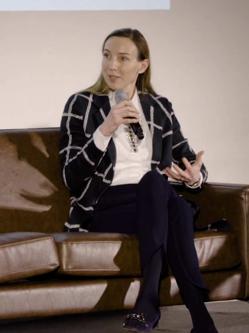 Die festliche Abendveranstaltung am 11. Februar 2020 bei Hapag-Lloyd in Hamburg bildete die erste Etappe einer Wissensreise durch Deutschland, die der Stifterverband und die Deutsche Forschungsgemeinschaft (DFG) aus Anlass ihres Jubiläums gestartet haben. Zum Auftakt waren speziell Mitglieder, Freunde und Förderer aus Bremen, Hamburg, Mecklenburg-Vorpommern, Niedersachsen und Schleswig-Holstein eingeladen. Der Stifterverband und die DFG schauten zurück auf ihre Anfänge und nehmen die Gegenwart und Zukunft in den Blick. Auf fünf weiteren Regionalveranstaltungen geht es dann in den kommenden Monaten einmal quer durch die Bundesrepublik. Veranstaltungsprogramm